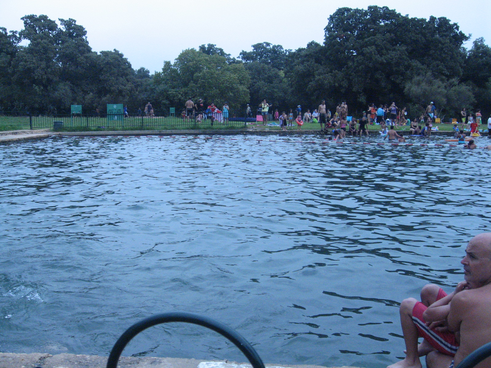 בריכת השחייה בחורשת טל